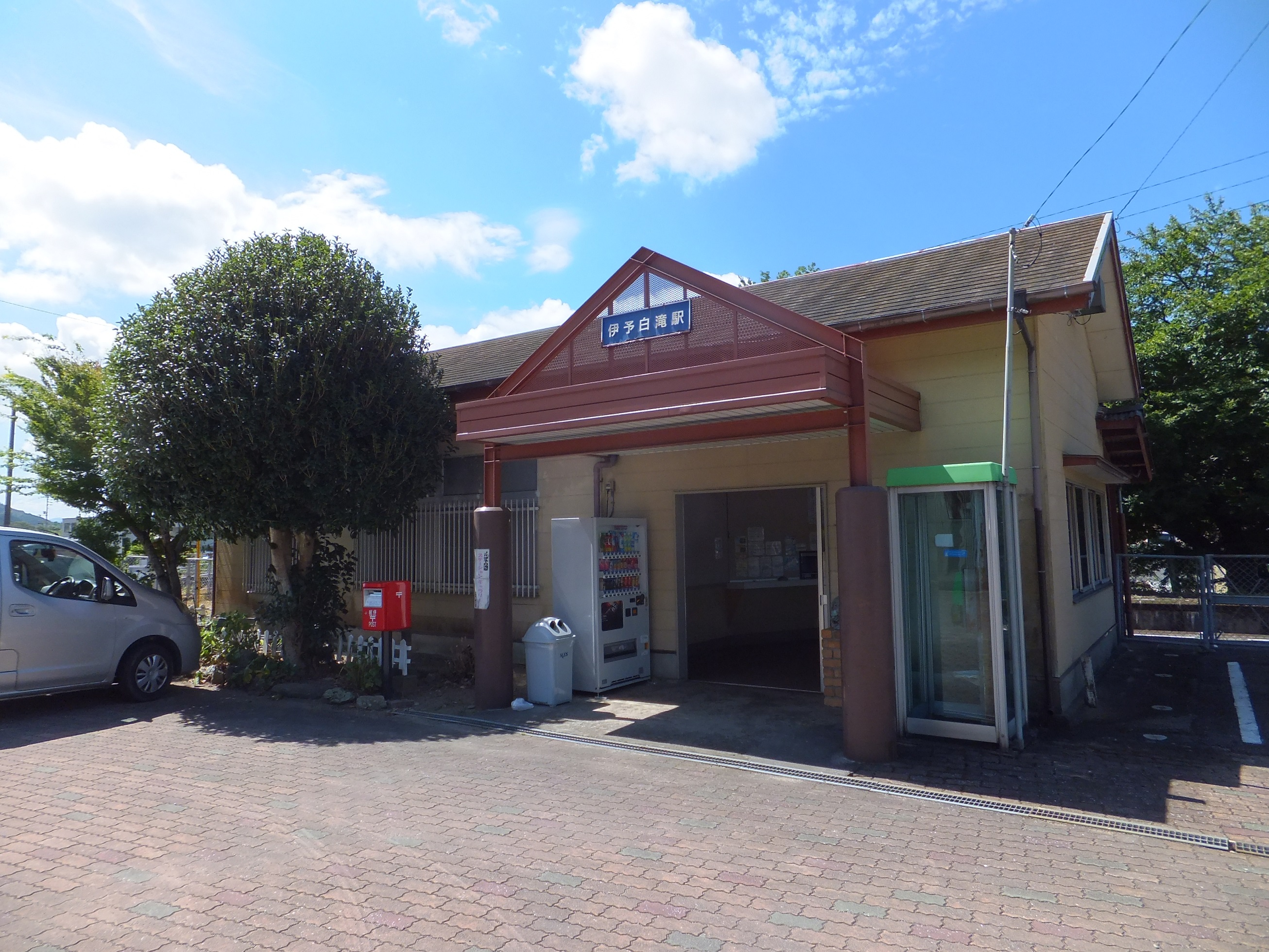 愛媛県大洲市 JR四国予讃線 伊予白滝駅